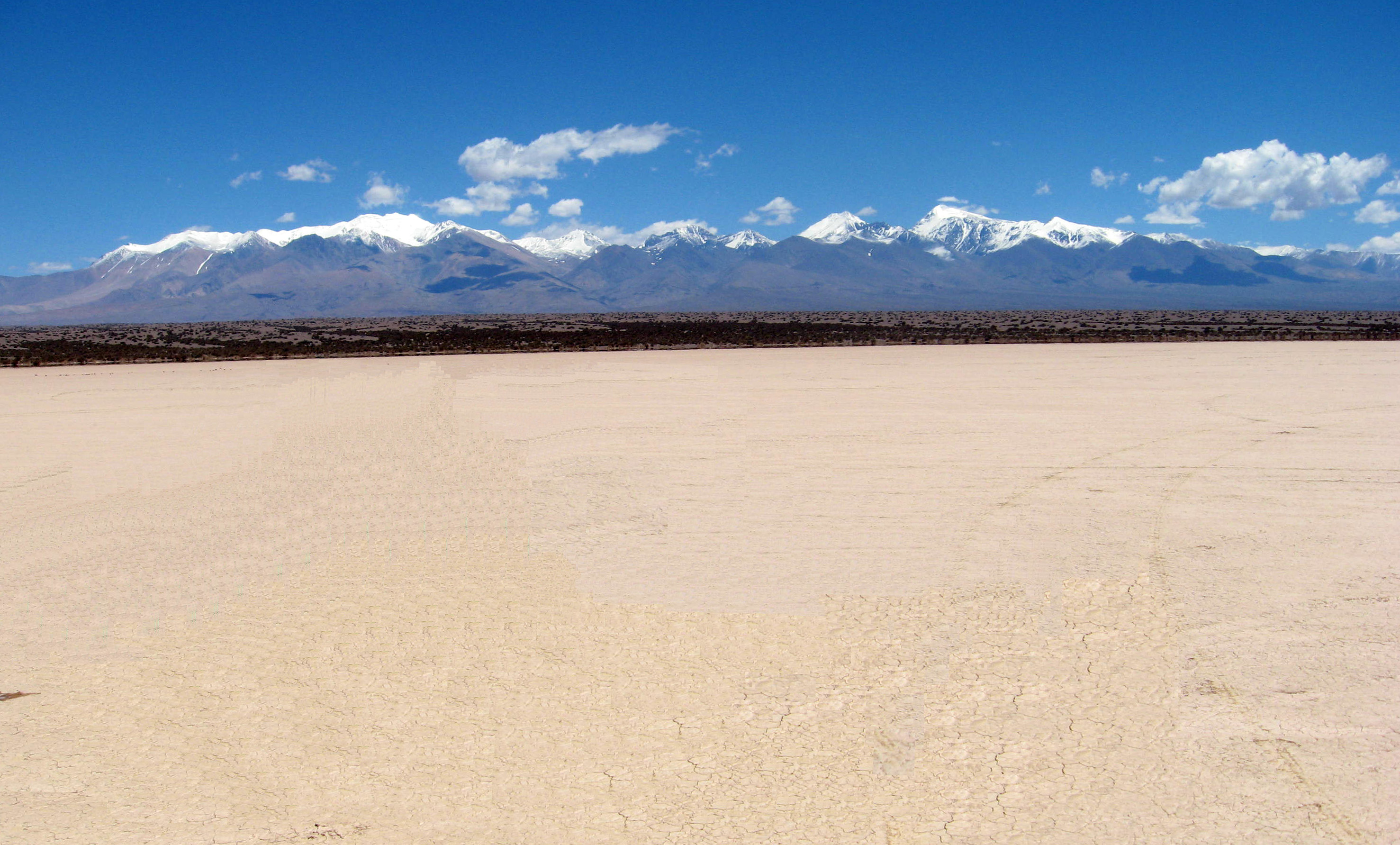 Fotografía del "Barreal Blanco" o "Pampa del Leaoncito" ubicada en el Dpto. Calingasta, provincia de San Juan, República Argentina.